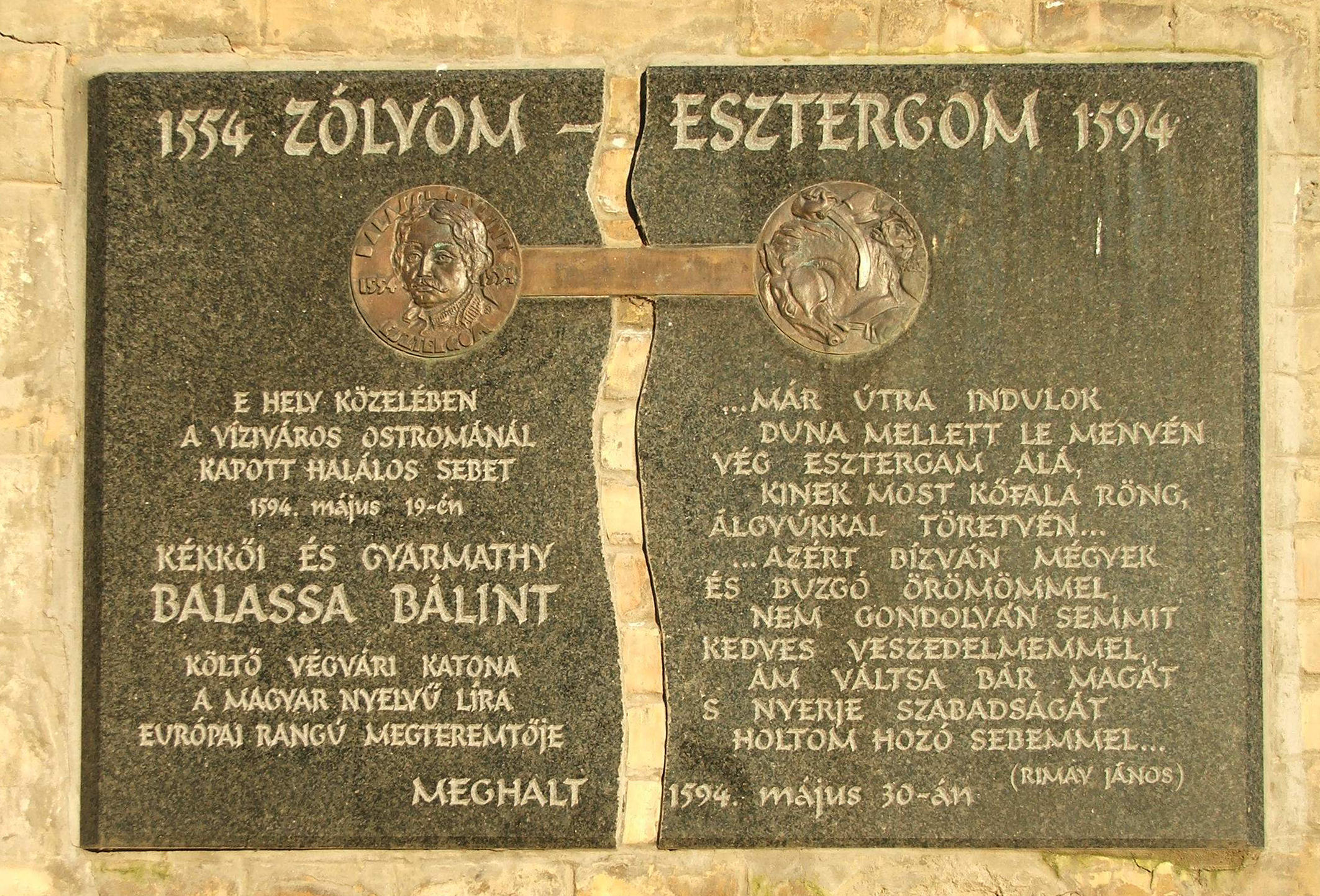 Balassi Bálint emléktáblája a vízivárosi várfalban. Kis-Duna sétány és Katona István u sarka